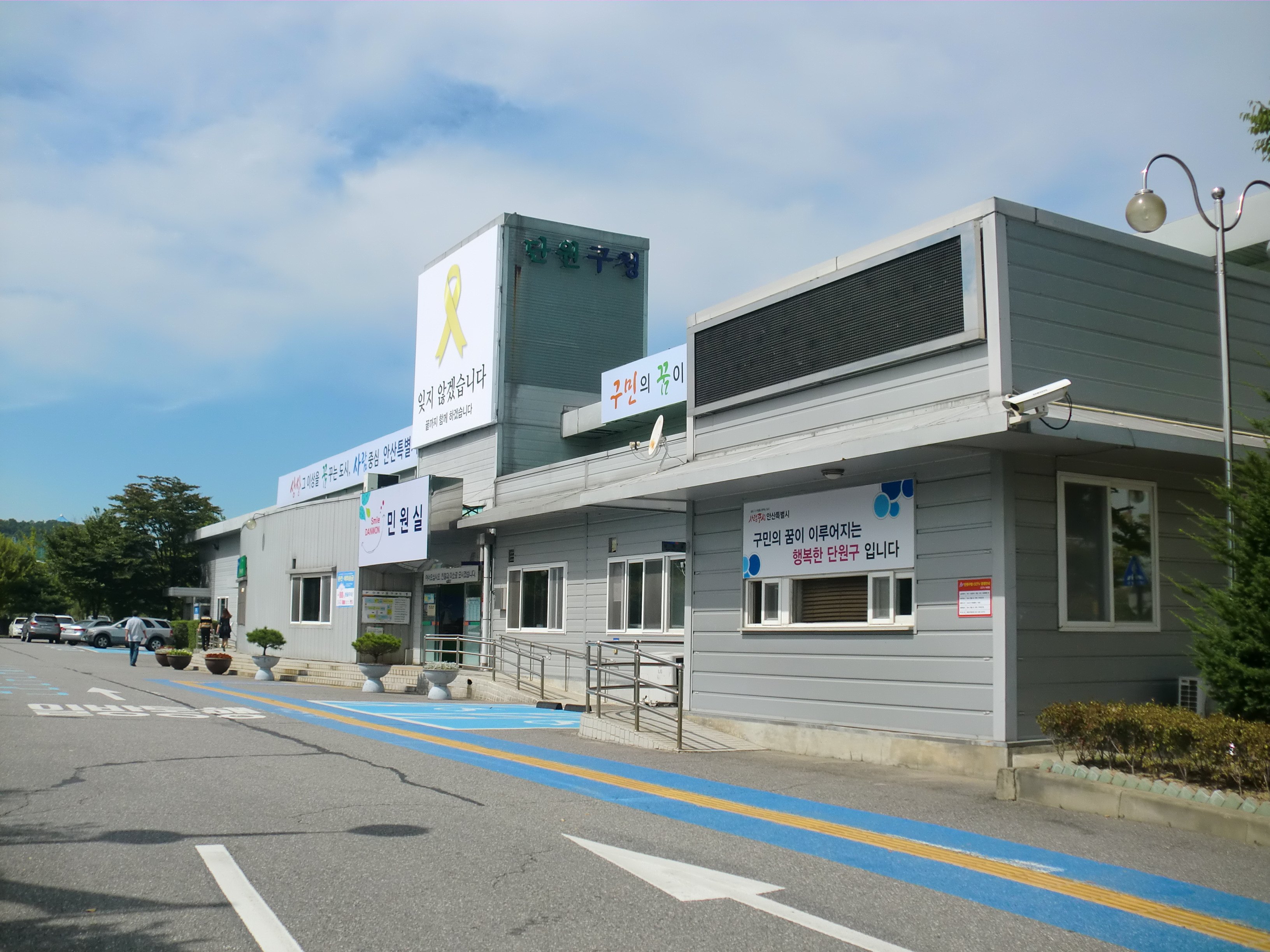 경기도 안산시에 있는 단원구청